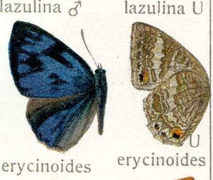 Poritia erycinoides